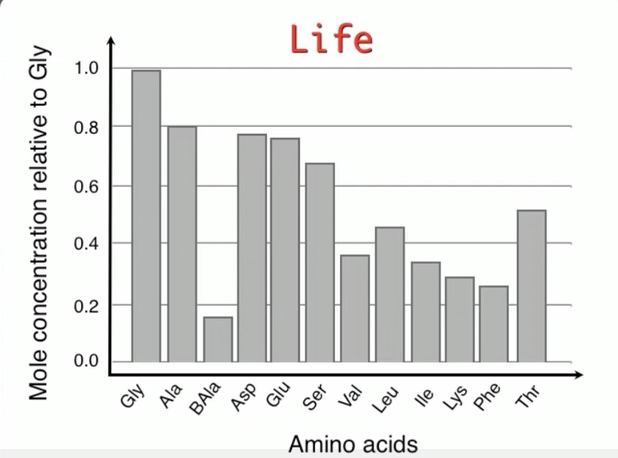 Graphique représentant la répartition des acides aminés dans un environnement vivant.